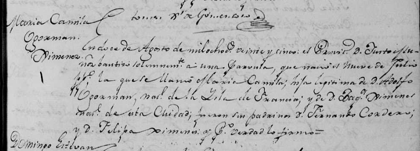 Nuestra Señora de La Merced, Ciudad de Buenos Aires, Capital Federal, Argentina